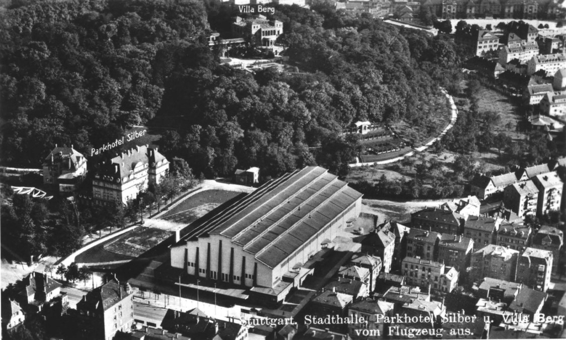 Stuttgart, Villa Berg, Villa mit Westparterre, Stadthalle und Parkhotel Silber, Luftbild, um 1930.